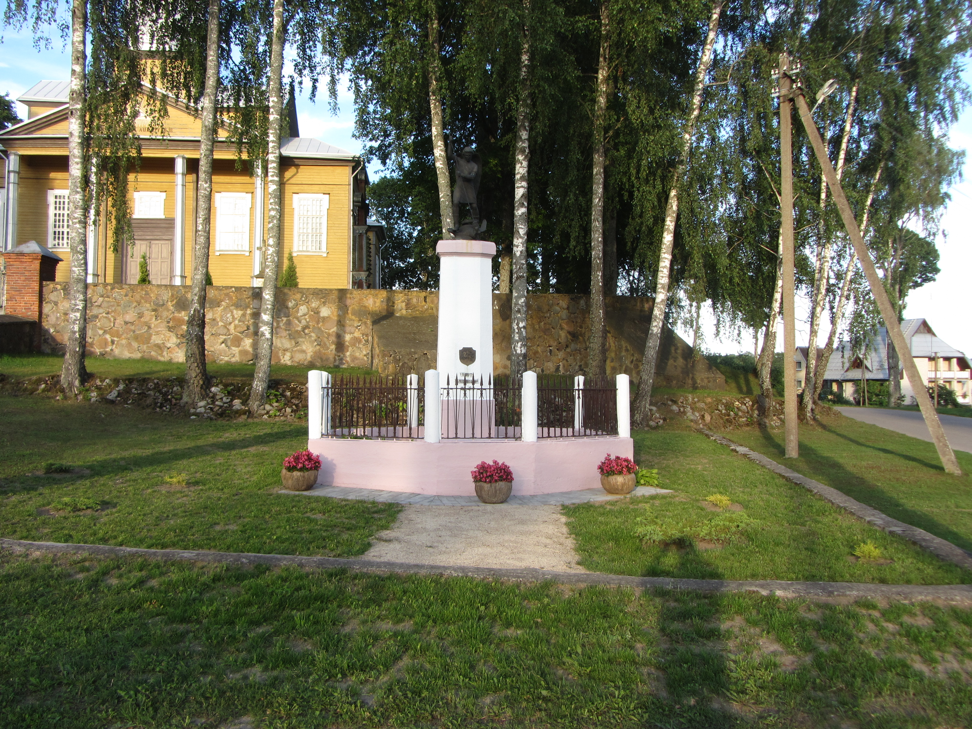 Kuktiškės, Lithuania